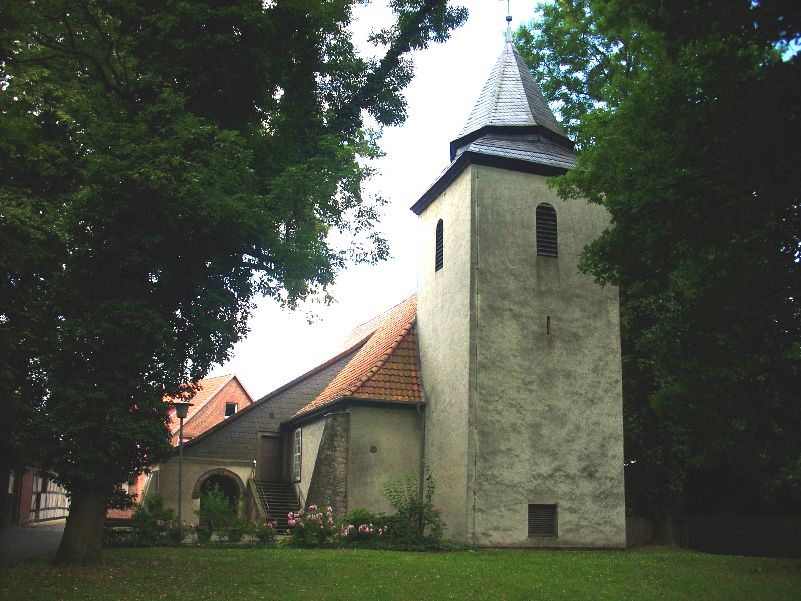 Ev.-luth. Kirche St. Katharinen, Rethmar (zu Sehnde) (Germany)